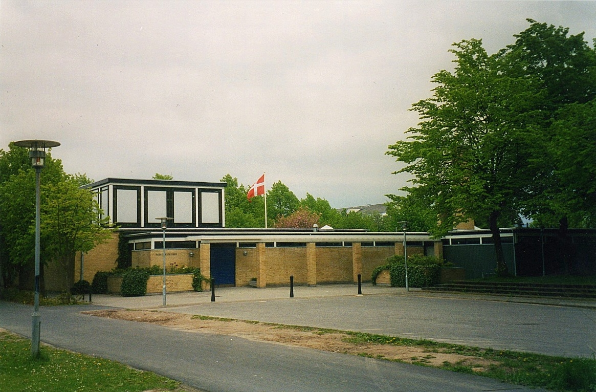 Hedegårdskirken, Pederstrup Sogn, Ballerup Kommune